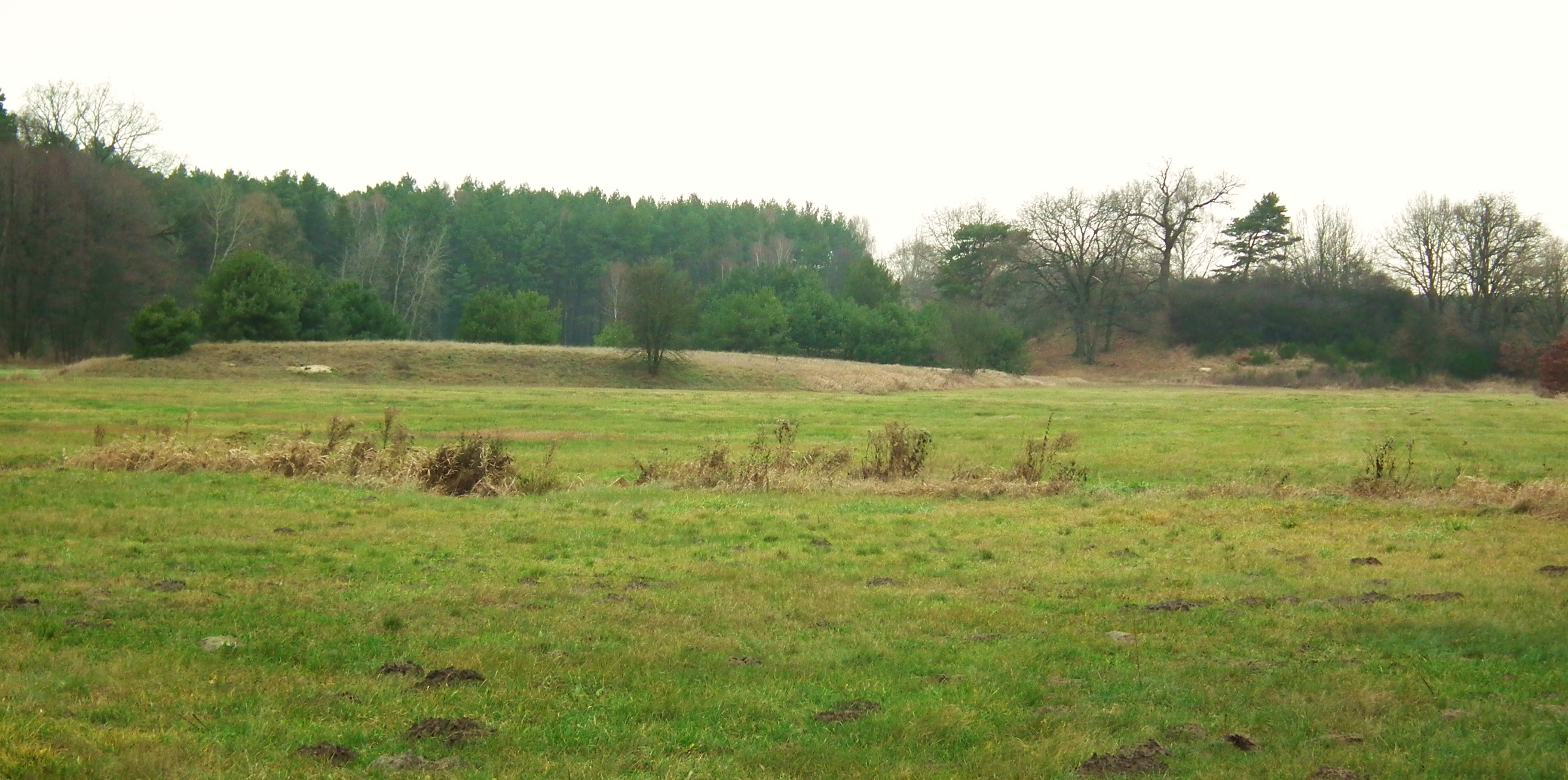 Grodzisko w Glinnie od płd. Gm. Skoki.